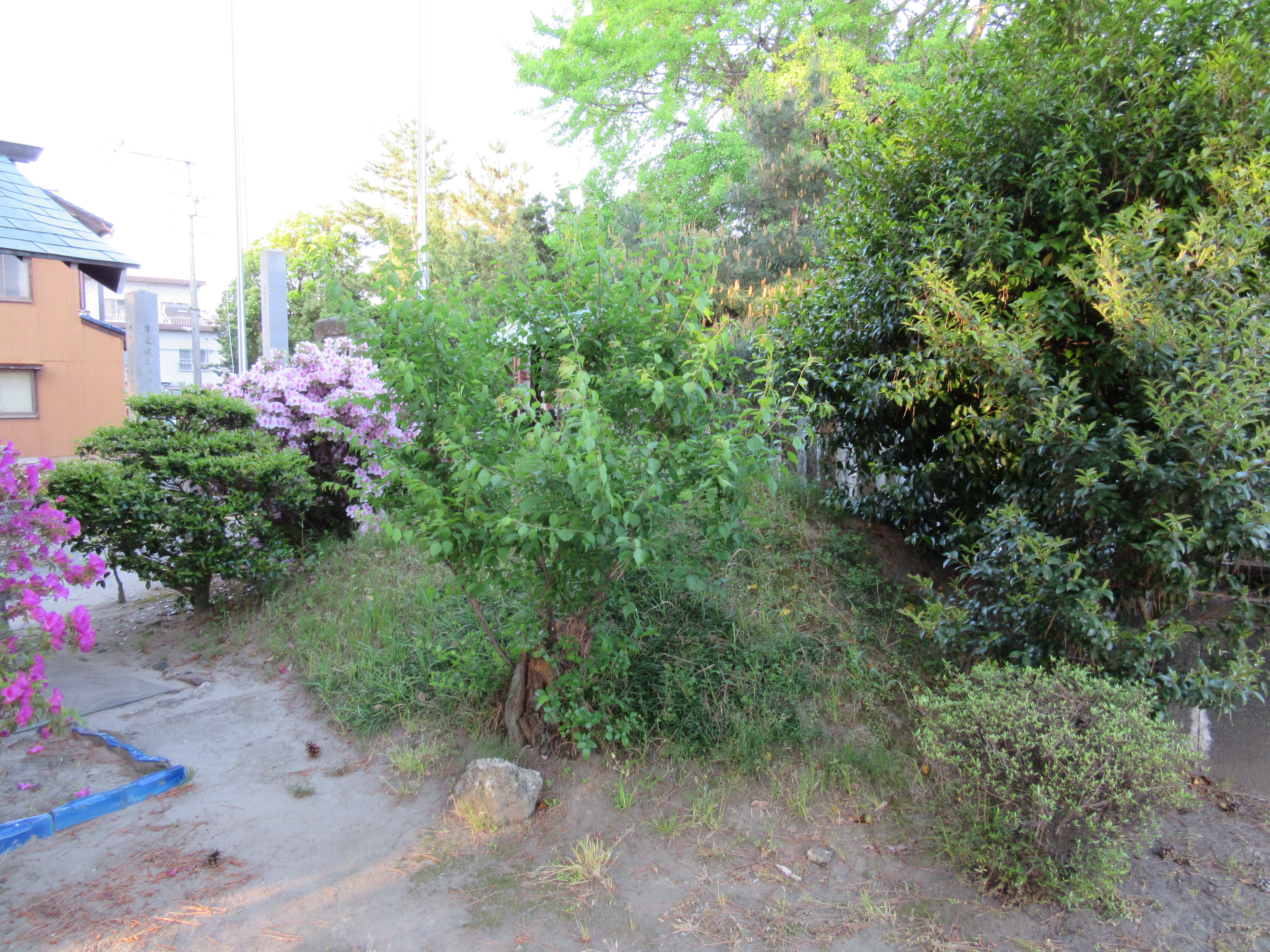 畑繋大神宮内に残る畑繋堤跡。松枝輪中の堤の唯一の残存部である